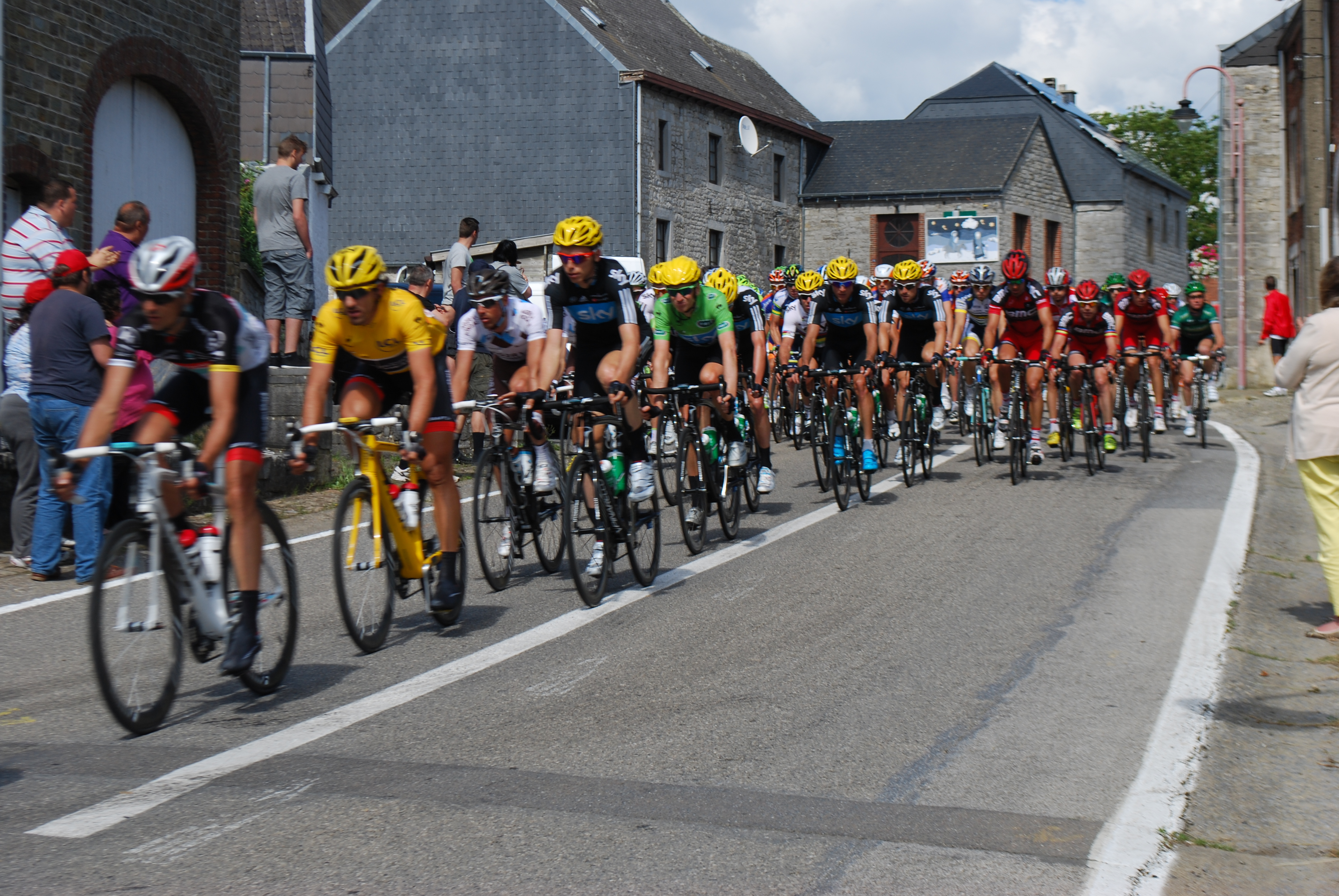 Vue du passage du peloton du Tour de France 2012 à Tohogne (Durbuy).